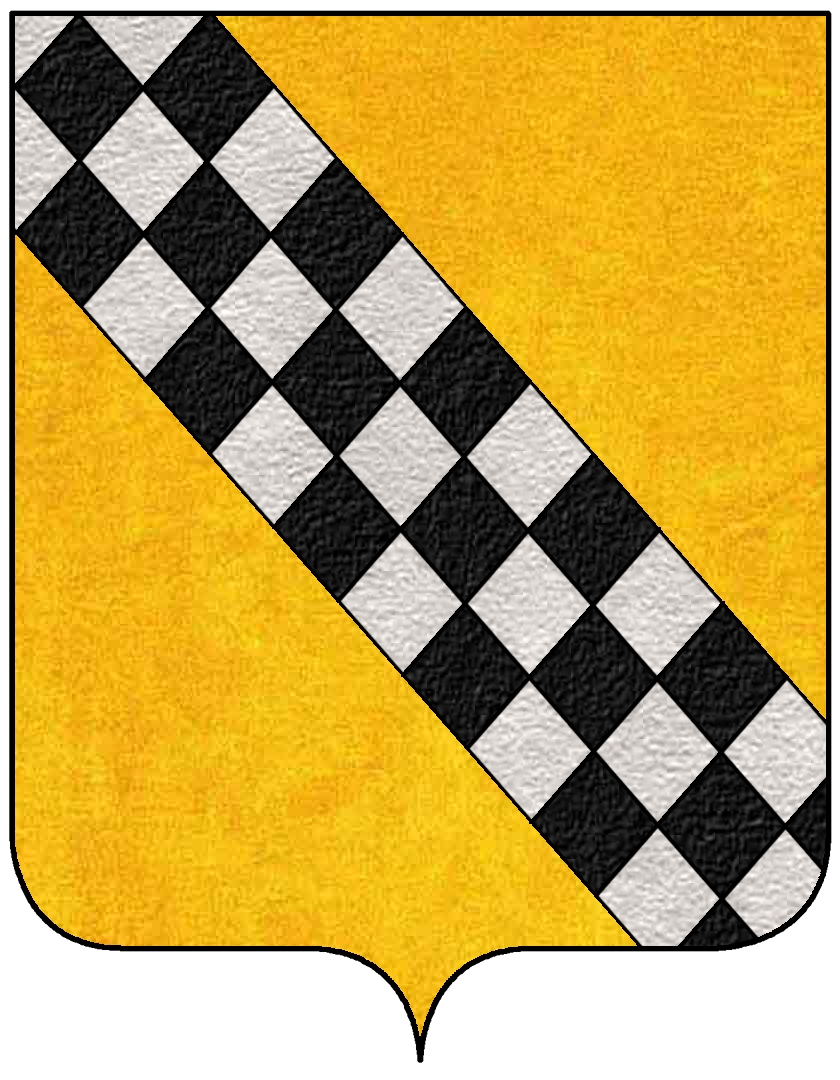 Stemma della famiglia Adorno